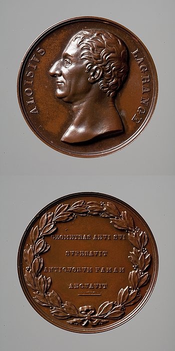 Medalla conmemorativa Lagrange. Museo Thorvaldsen (Dinamarca) Obra de Gaspari Galeazzi. Anterior a 1830 (fundación del Museo)